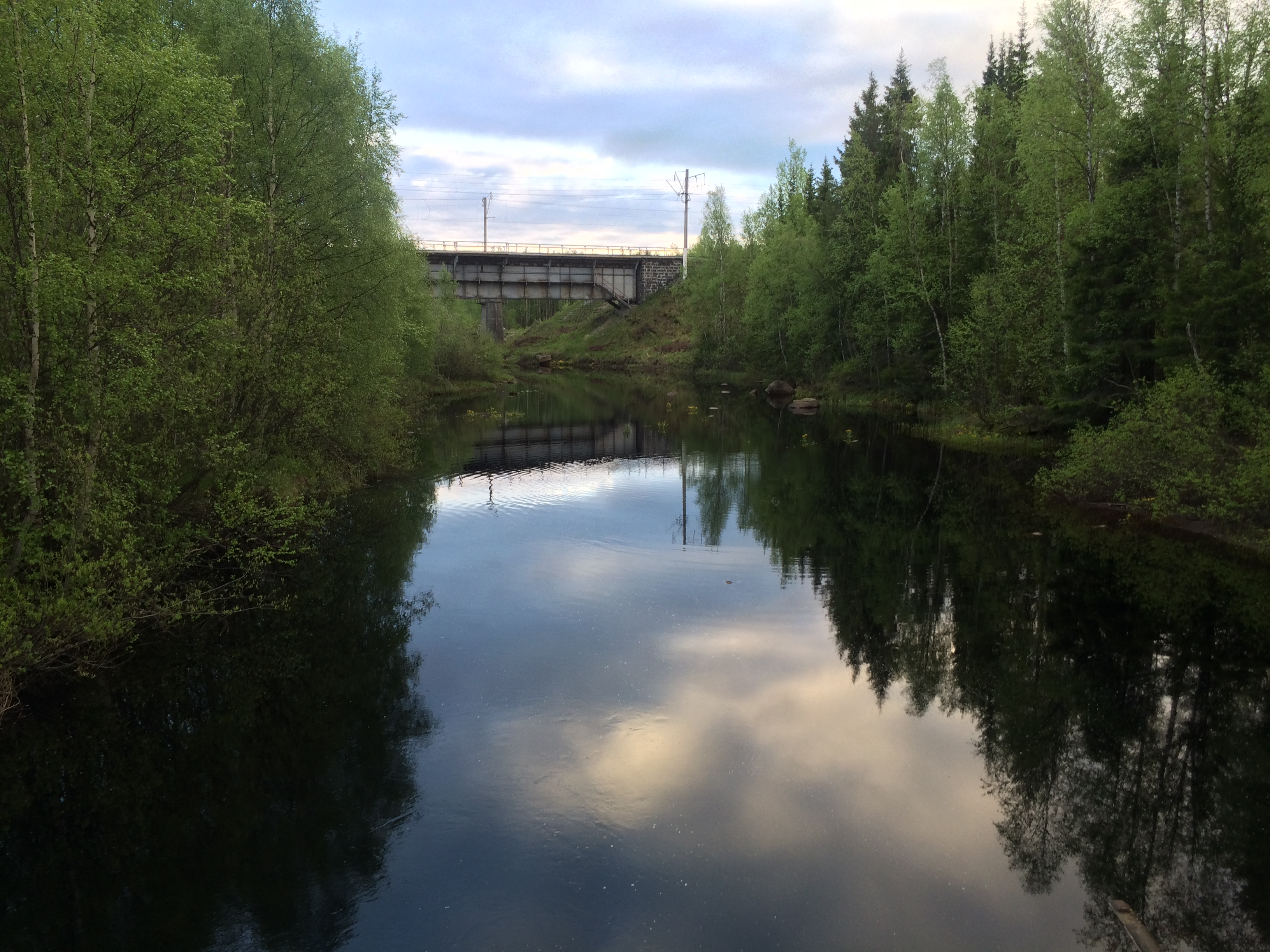 Березовка (река, впадает в Белое море)